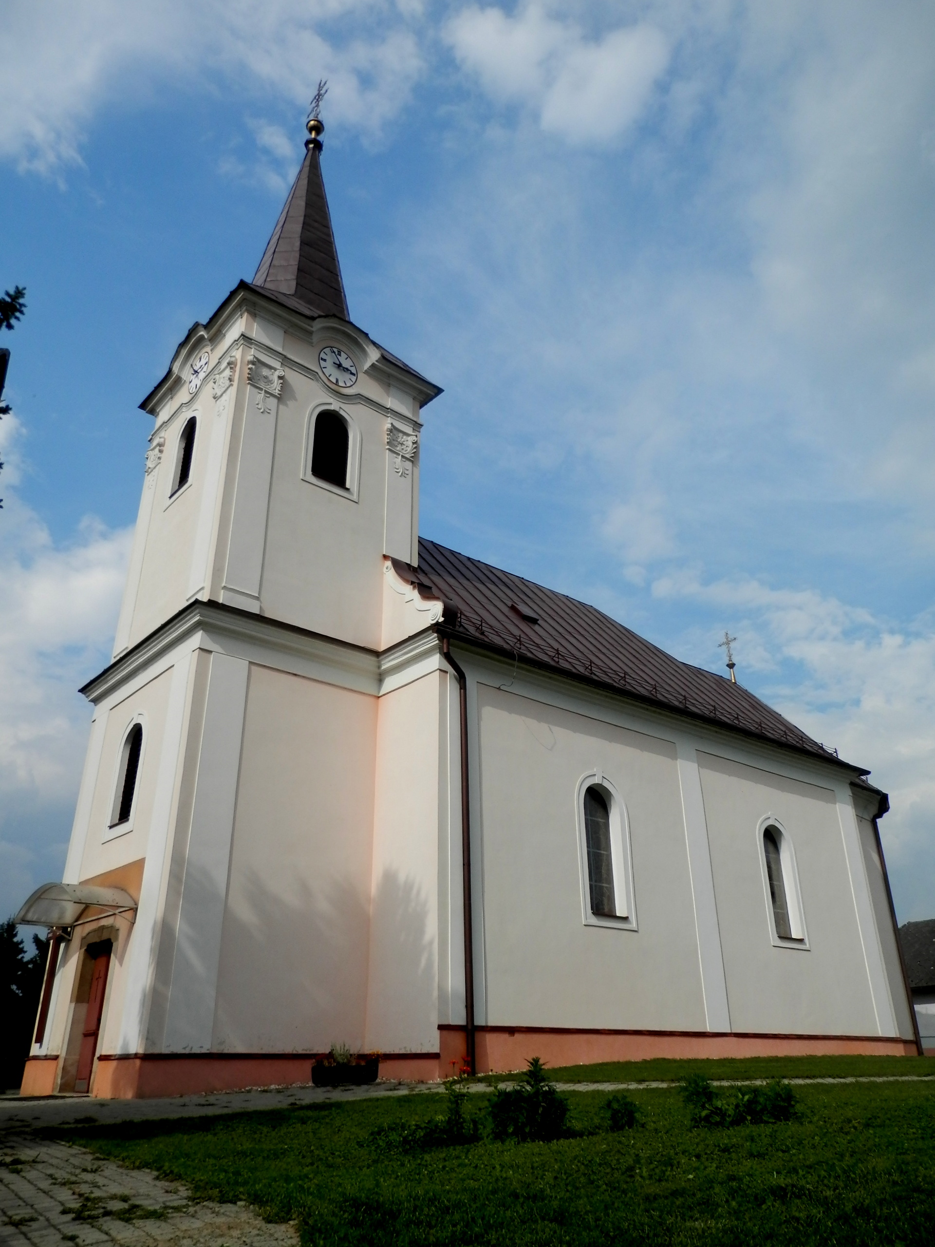 Kostol sv. Ondreja, apoštola bol postavený v r. 1784 jezuitmi v klasicistickom štýle. Obec Kojatice okres Prešov.